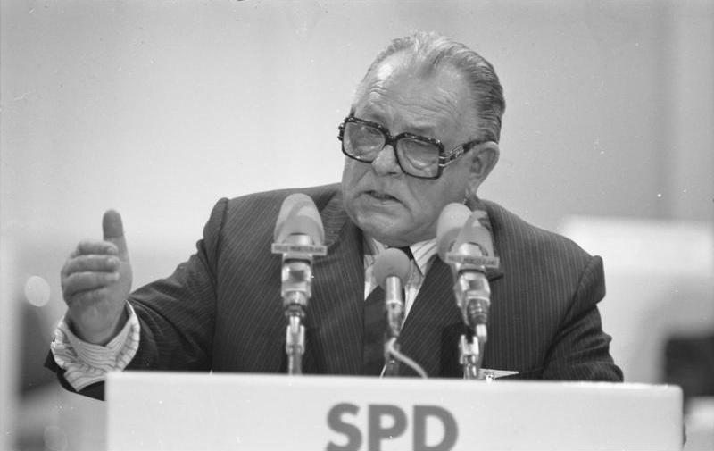 30.8.-2.9.1988 SPD-Parteitag in Münster, Halle Münsterland